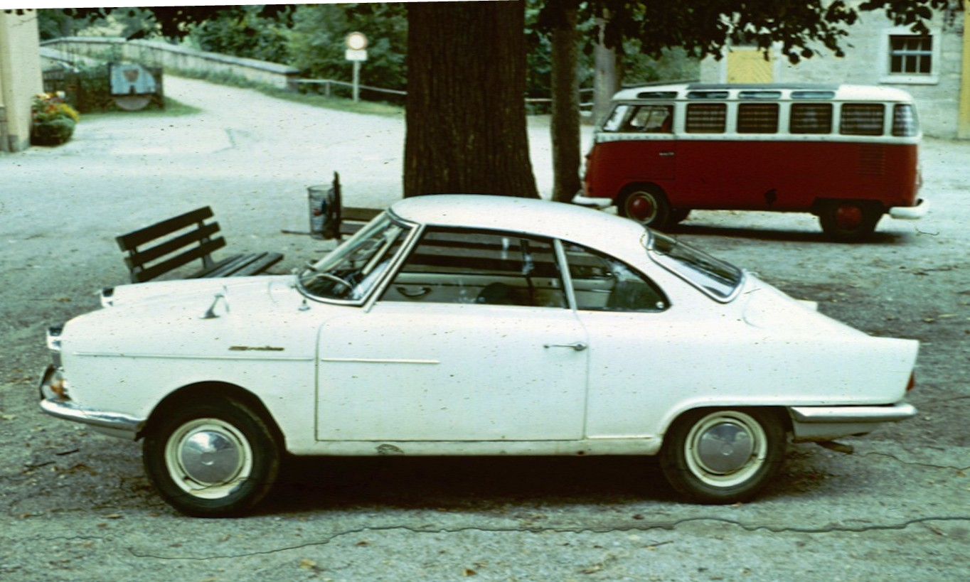 NSU Sportprinz